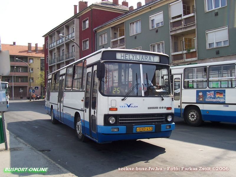 25-ös busz, Szombathely, Éhen Gyula tér